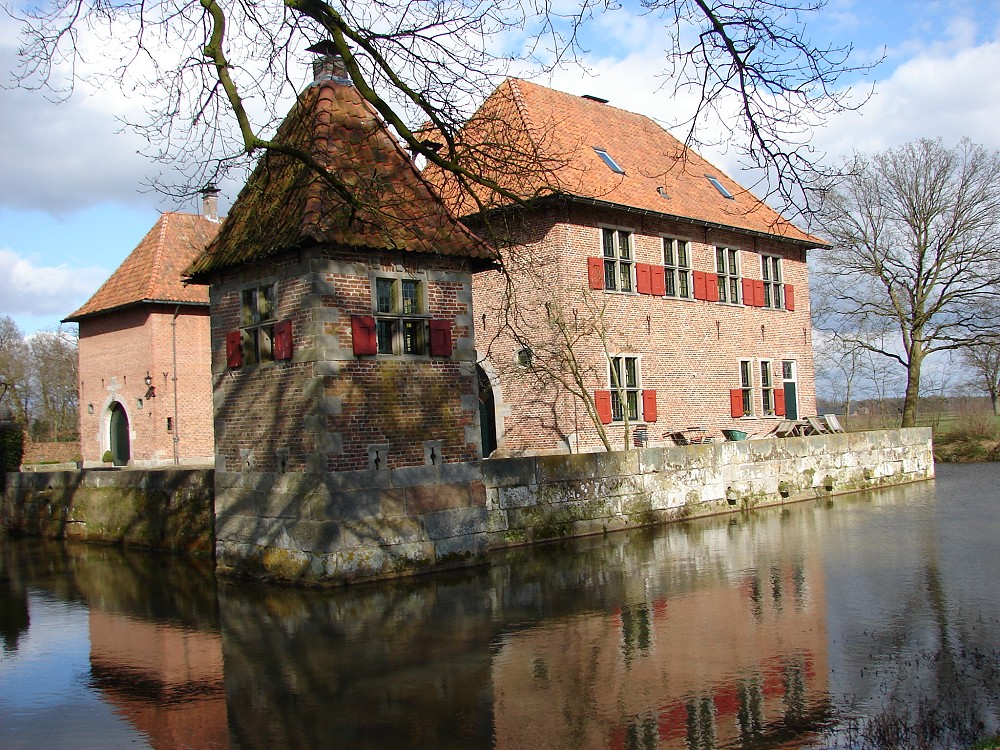 Het Huis te Breckelenkamp, april 2006